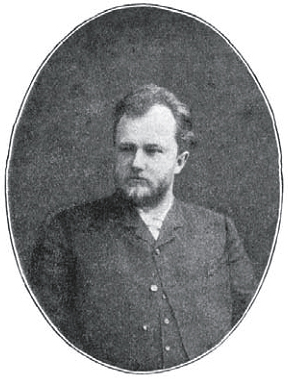 Портрет Фридриха Брейтфуса